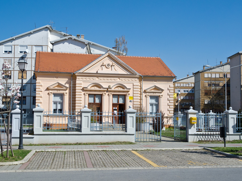 Lipik